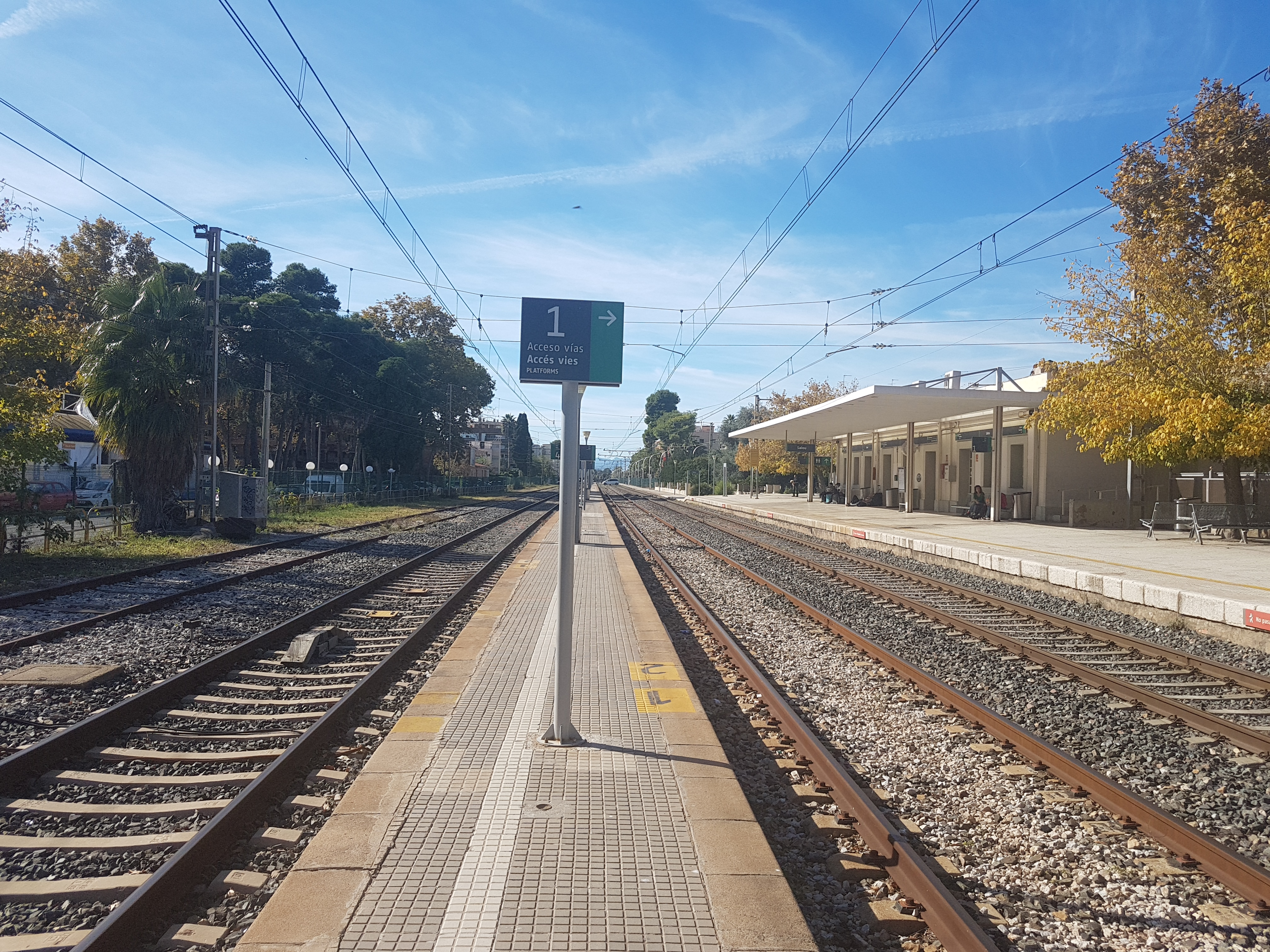 Edifici, vies i andanes de l'estació de Salou des de l'entrada procedent de Port Aventura a la línia Tarragona-Tortosa/Ulldecona